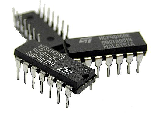 микросхемы фирмы ST в DIP14 корпусе